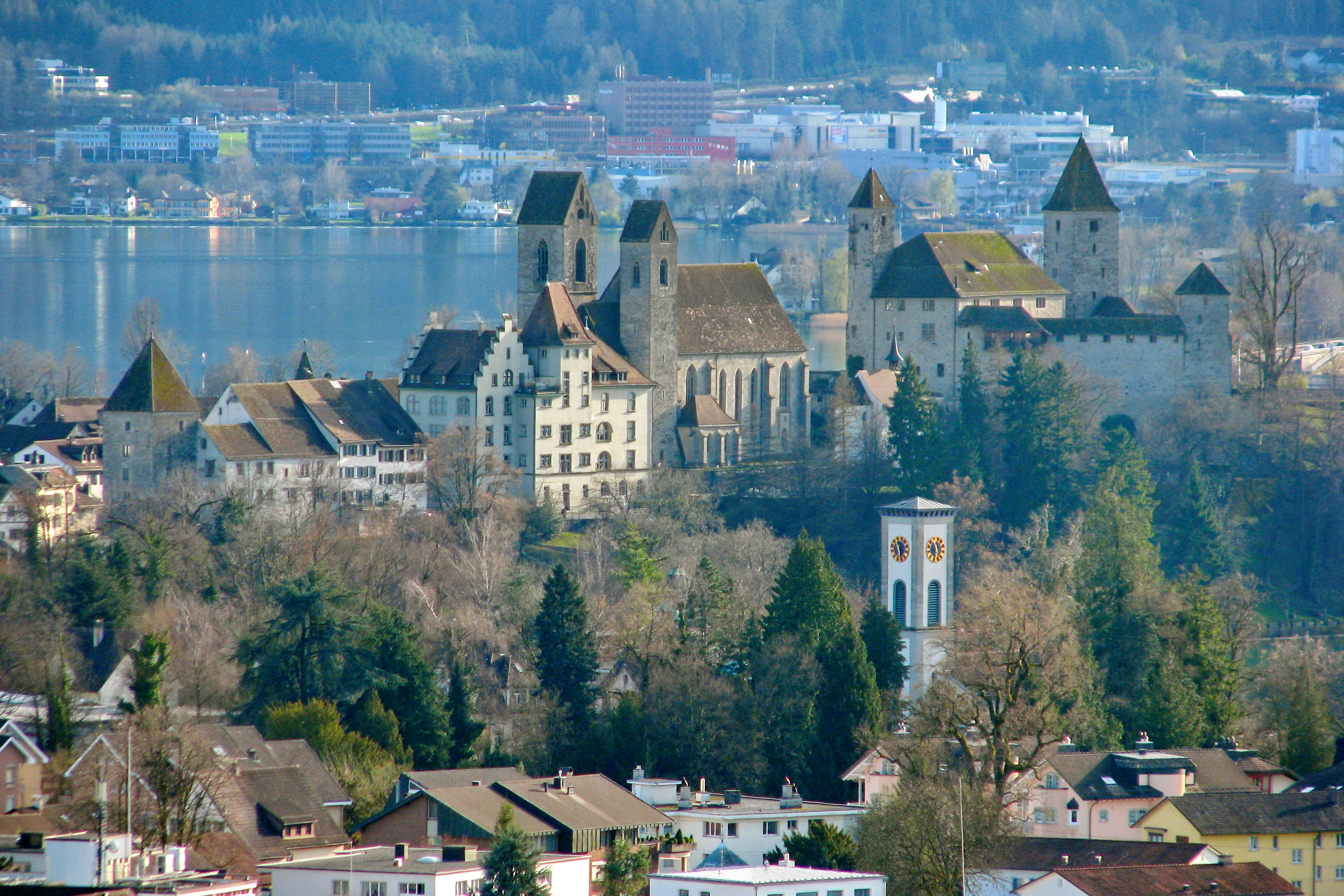 Kempratner Bucht (Bay of Kempraten) and Herrenberg in Rapperswil (SG), i.e. Stadtmuseum, Stadtpfarrkirche St. Johann (St. John's Church), Liebfrauenkapelle and Schloss Rapperswil, as seen from Frohberg in Kempraten-Lenggis (Switzerland); Pfäffikon (SZ) and Obersee (upper Lake Zürich) in the background.